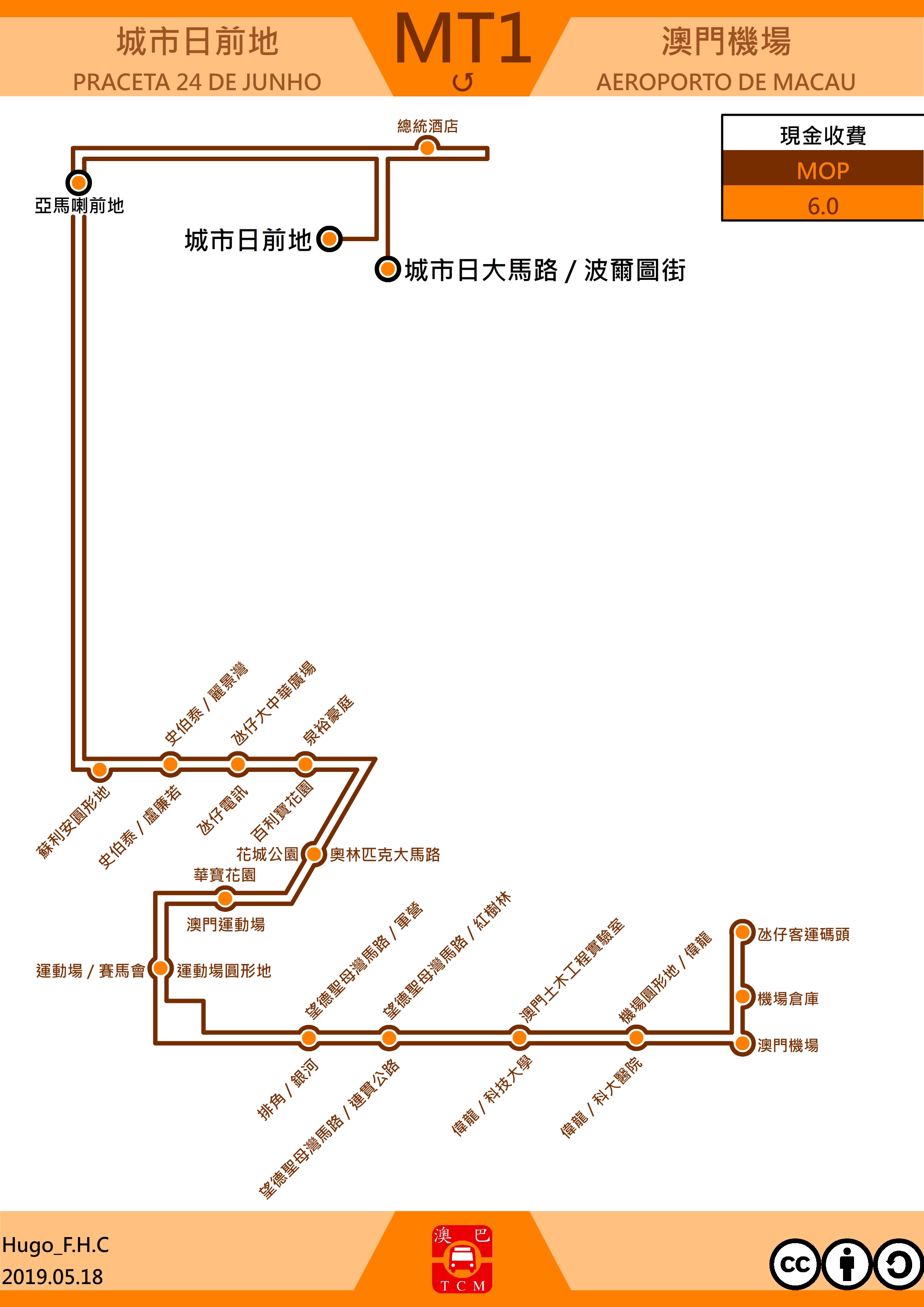 澳門巴士MT1走線圖